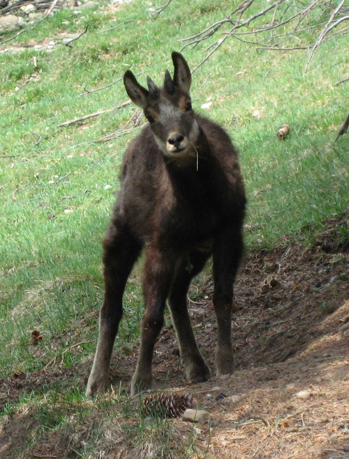 Rupicapra rupicapra in Parc de Merlet (Chamois) Map: 45° 54' 26" N 6° 49' 2" E